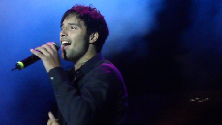 Agustin Arguello con Tobby en 2011 Celaya